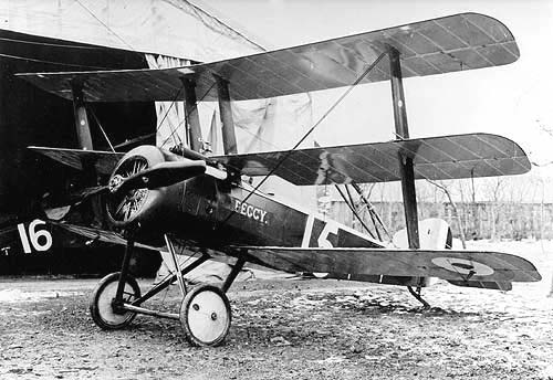 Triplane